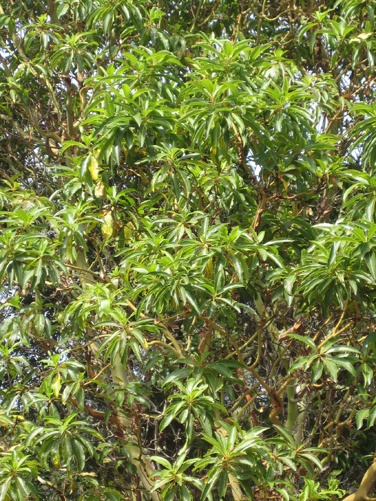 Arbutus canariensis. Madroño canario en la Gomera.